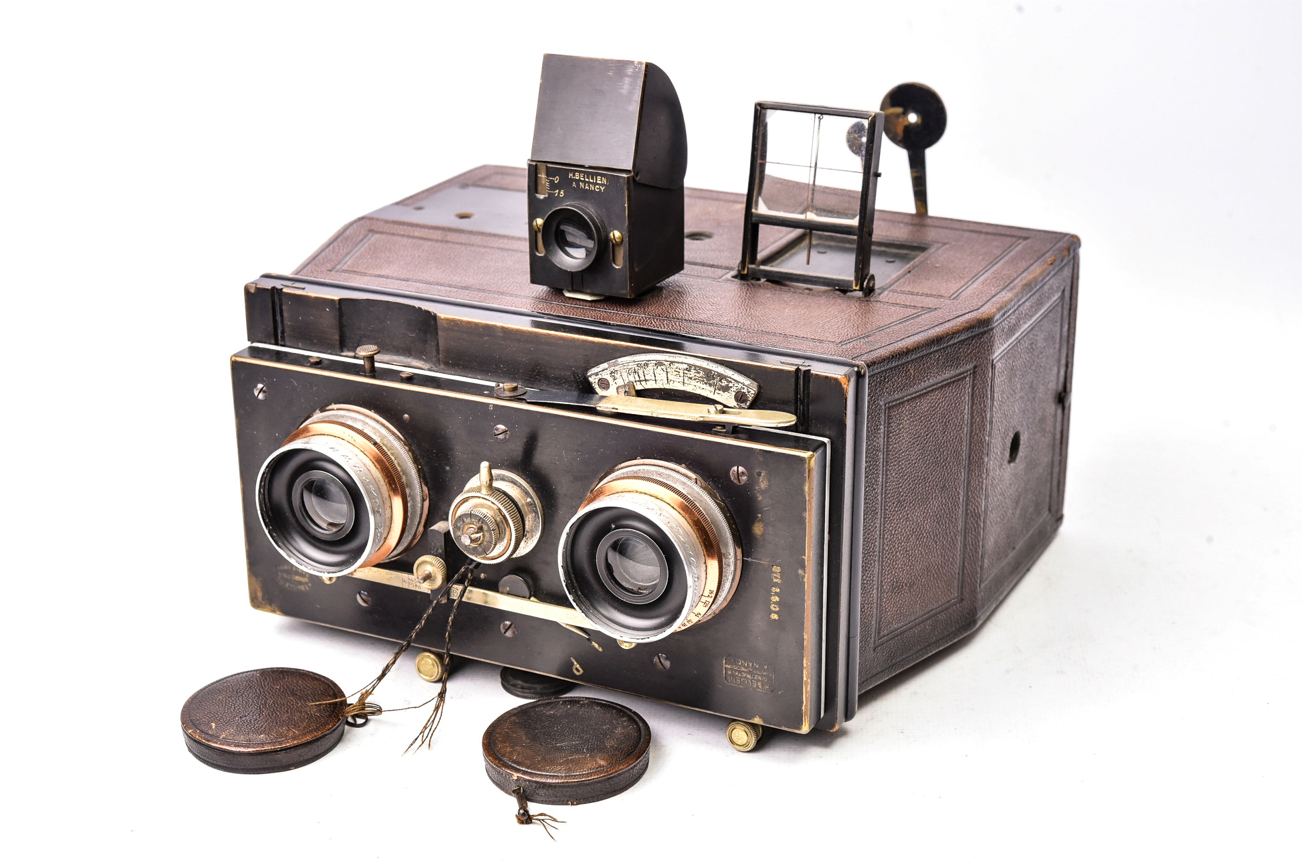 Jumelle stéréoscopique Bellieni à décentrement vertical, au format deux fois 8x9cm. Elle fut présentée à la Société française de Photographie le 2 février 1900. La mise au point s’effectue à partir de 2 mètres jusqu’à l’infini au moyen d’une double rampe hélicoïdale. La visée s’effectue par œilleton à verre compensateur et viseur concave. L’œilleton se déplace verticalement sur une réglette graduée en fonction du niveau de décentrement. Un pendule sur le front du viseur permet de garantir l’horizontabilité. Carl Zeiss Iéna Protar 1 :8 – F=110mm. Collection Sébastien Lemagnen/Antiq-Photo Gallery